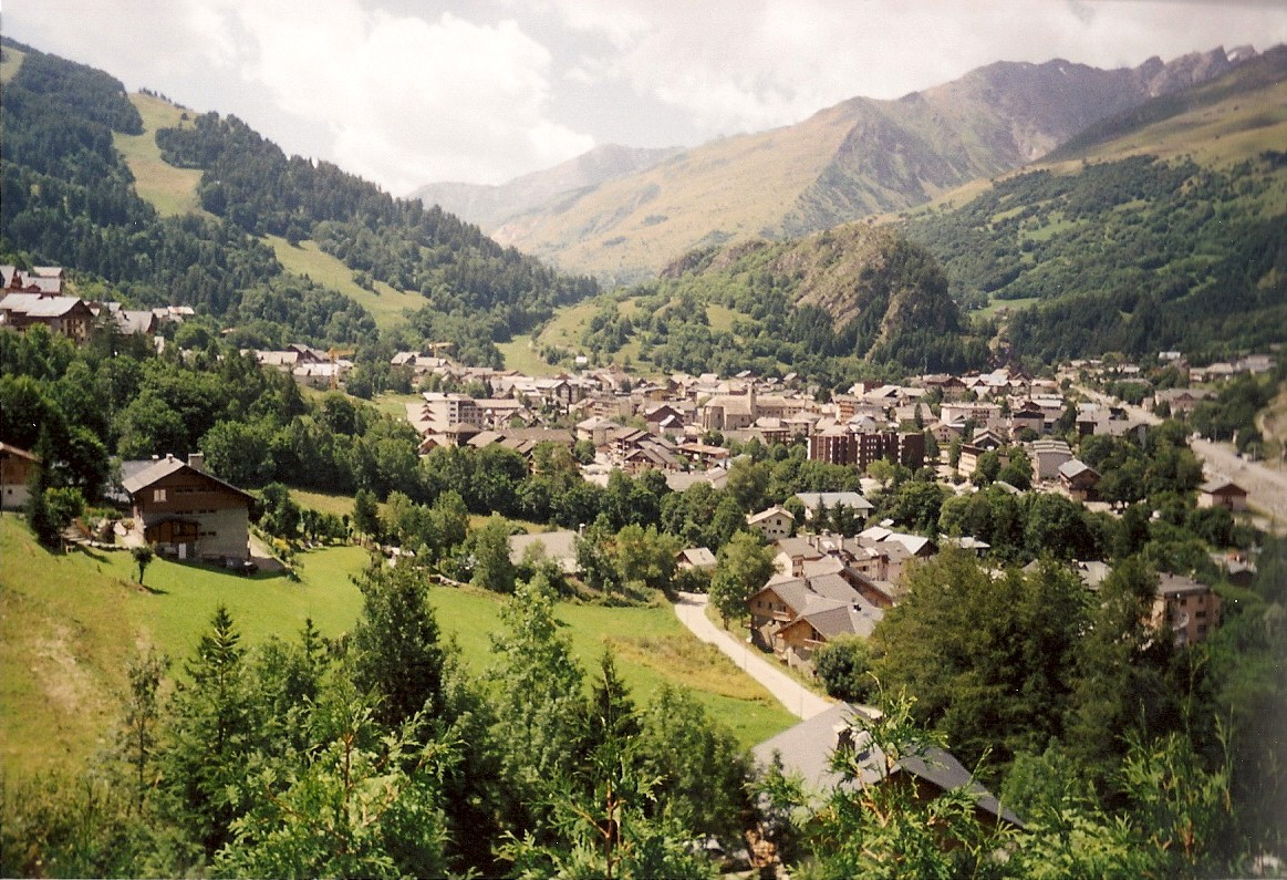 Valloire